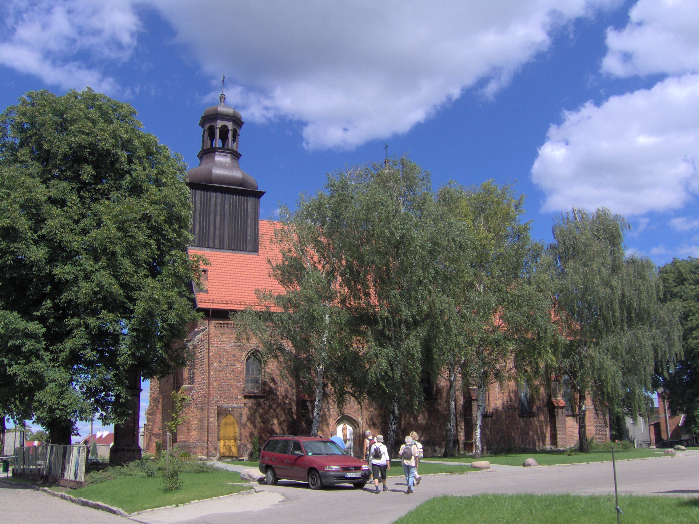 Kościół pw św. Mikołaja w Gniewkowie